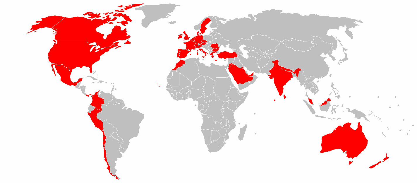 Autogrill global locations.PNG